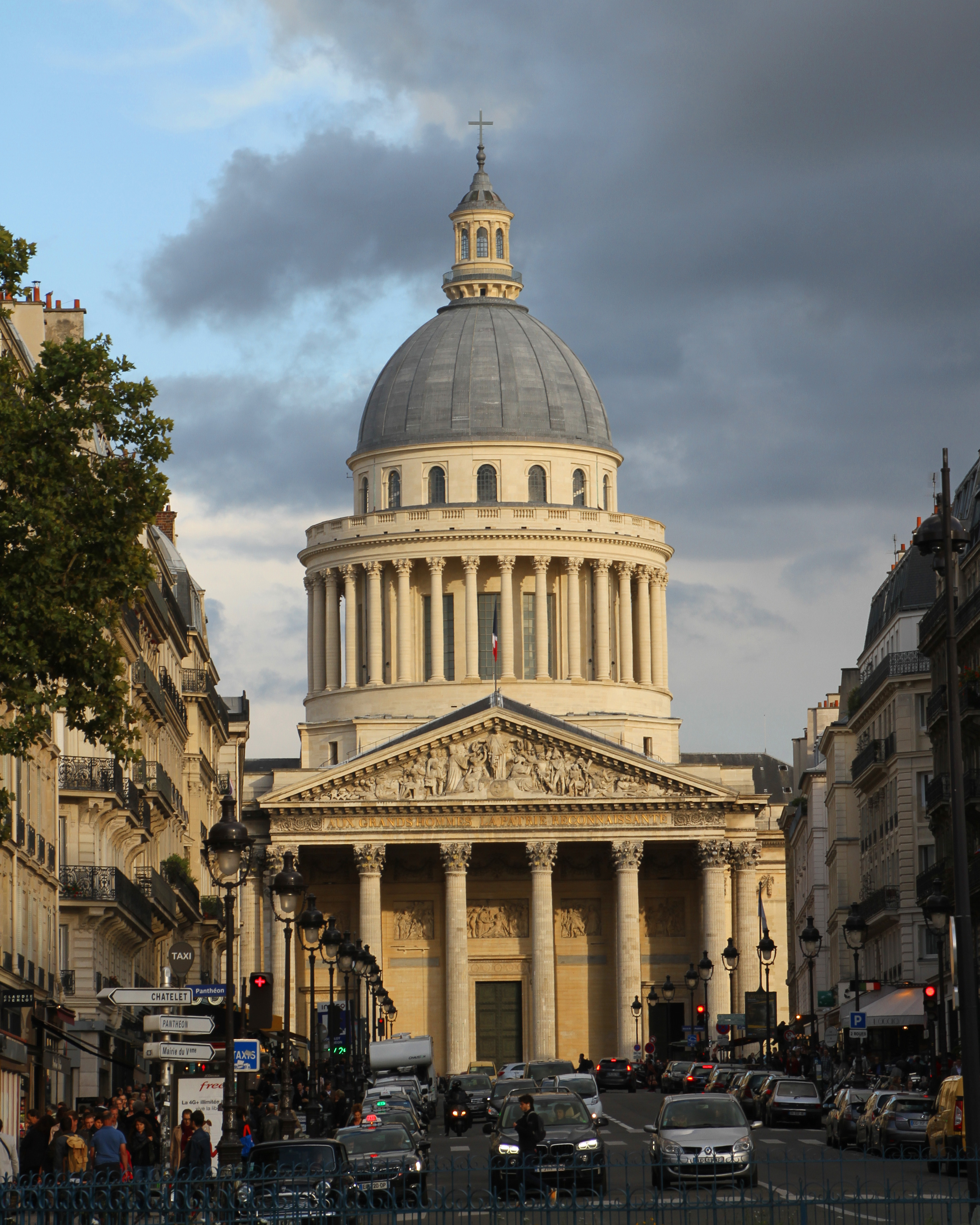 Panthéon in Paris